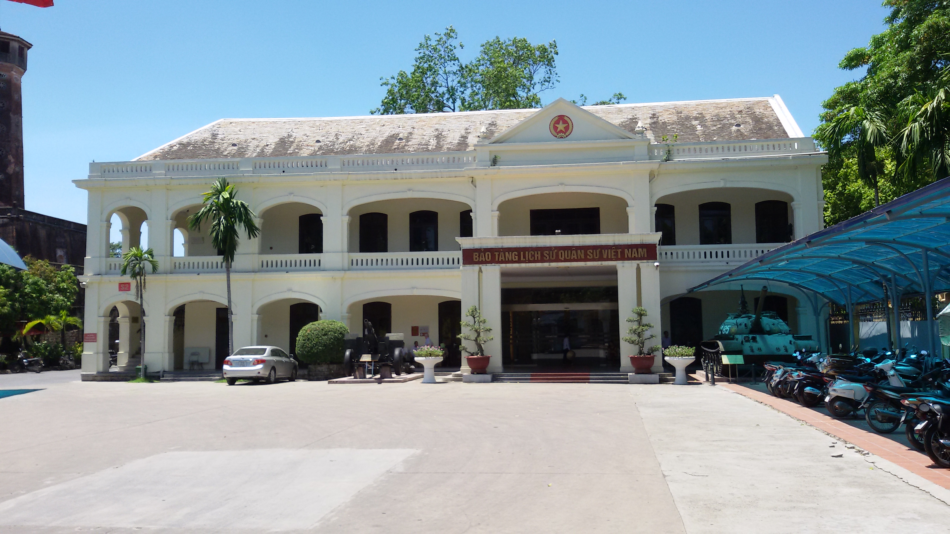 Vietnam Military History Museum, Hanoi